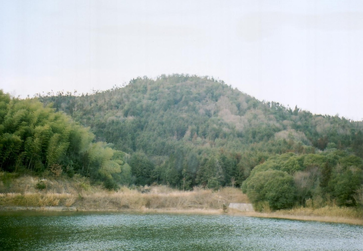 Sj-banyu